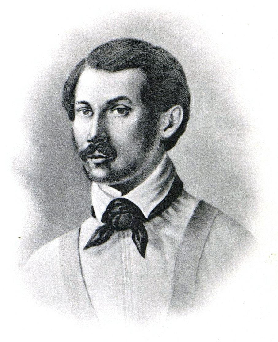 Бестужев, Александр Александрович